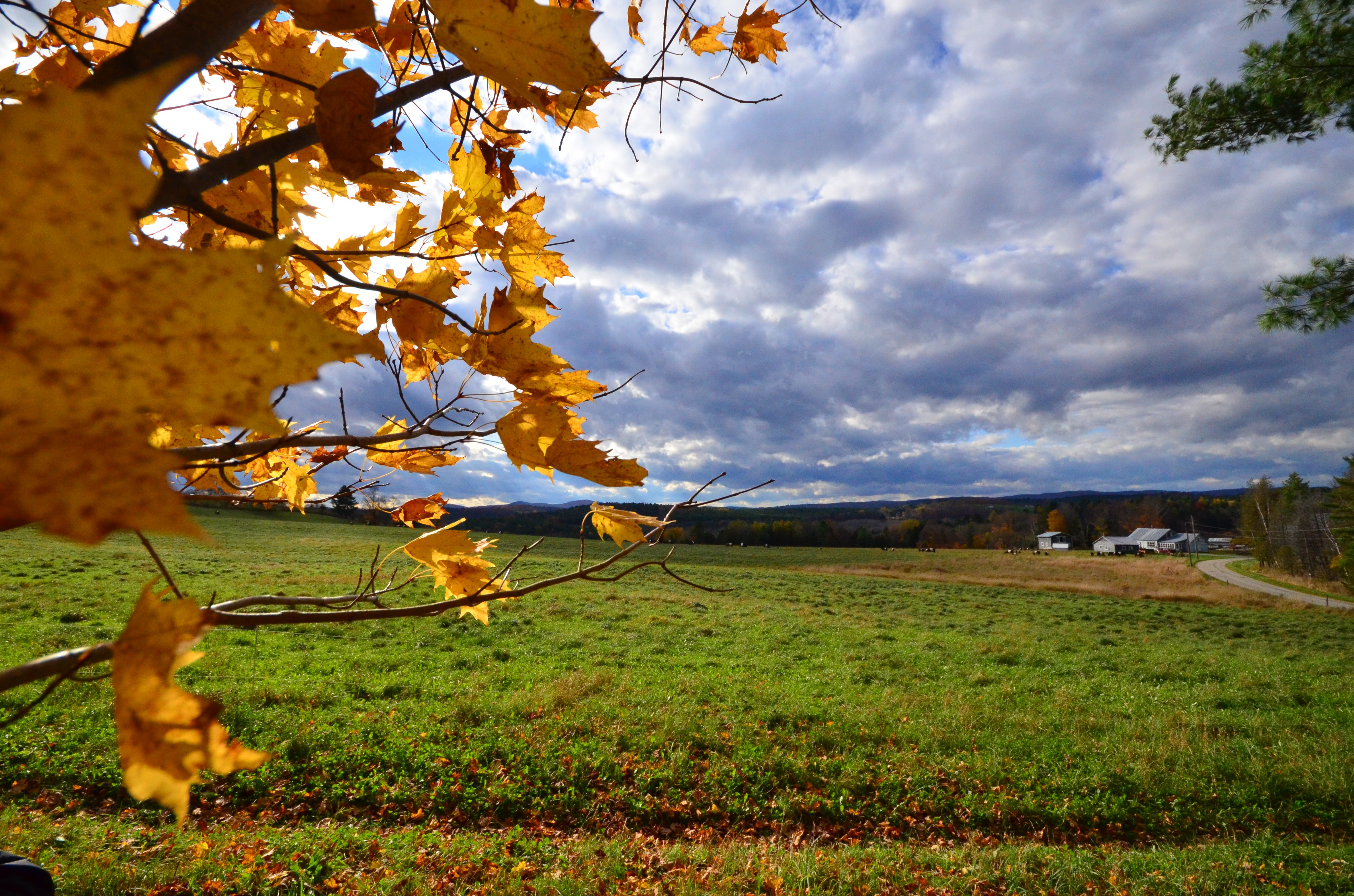 Vermont